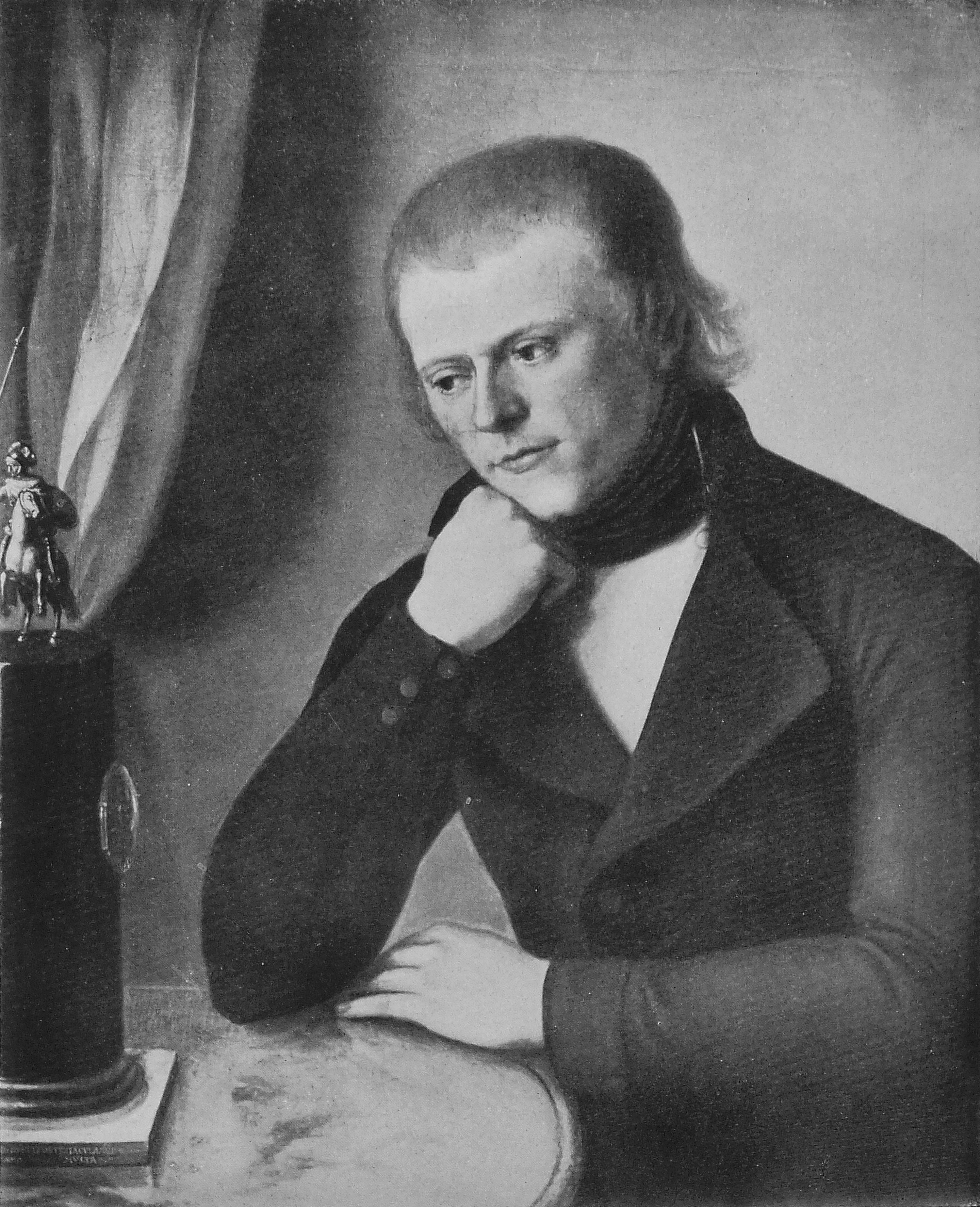 Dr. Johann Heinrich Ferdinand Autenrieth (Öl auf Leinwand)